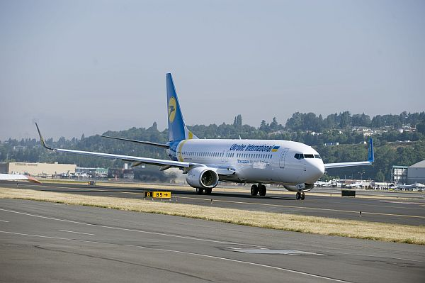 Самолёт Boeing 737-800 в аэропорту Борисполь (МАУ)